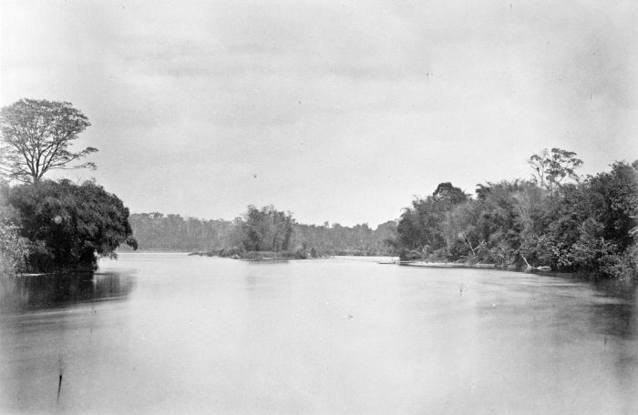 Foto. Deze foto is gemaakt tijdens de Sumatra Expeditie van 1877-1879. Landschappen uit de afdeeling Rawas.. De rivier Batang Rawas onder Soeroelangoen, district Rawas Sumatra